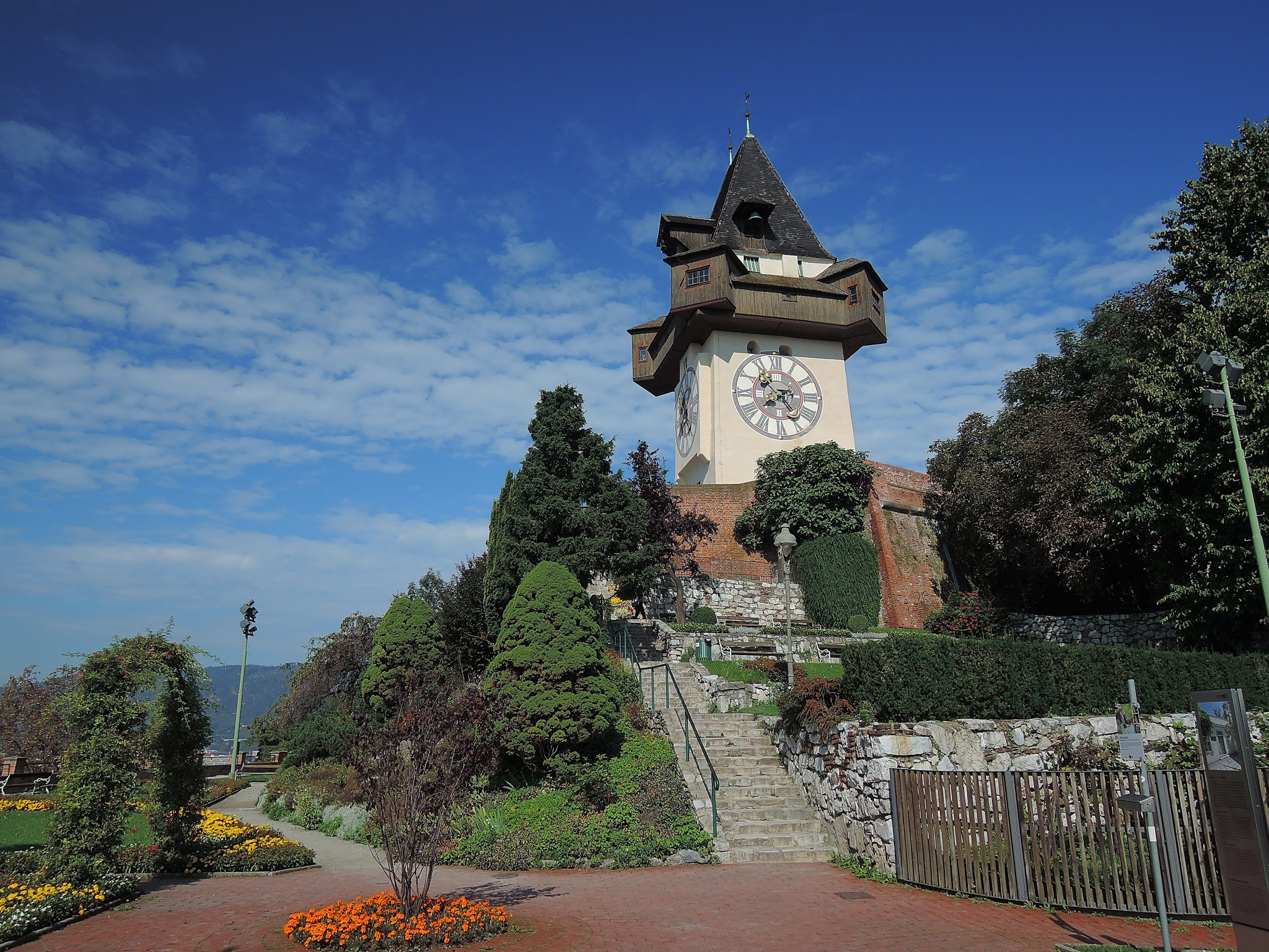 Schloßberg, 8010 Graz, Austria